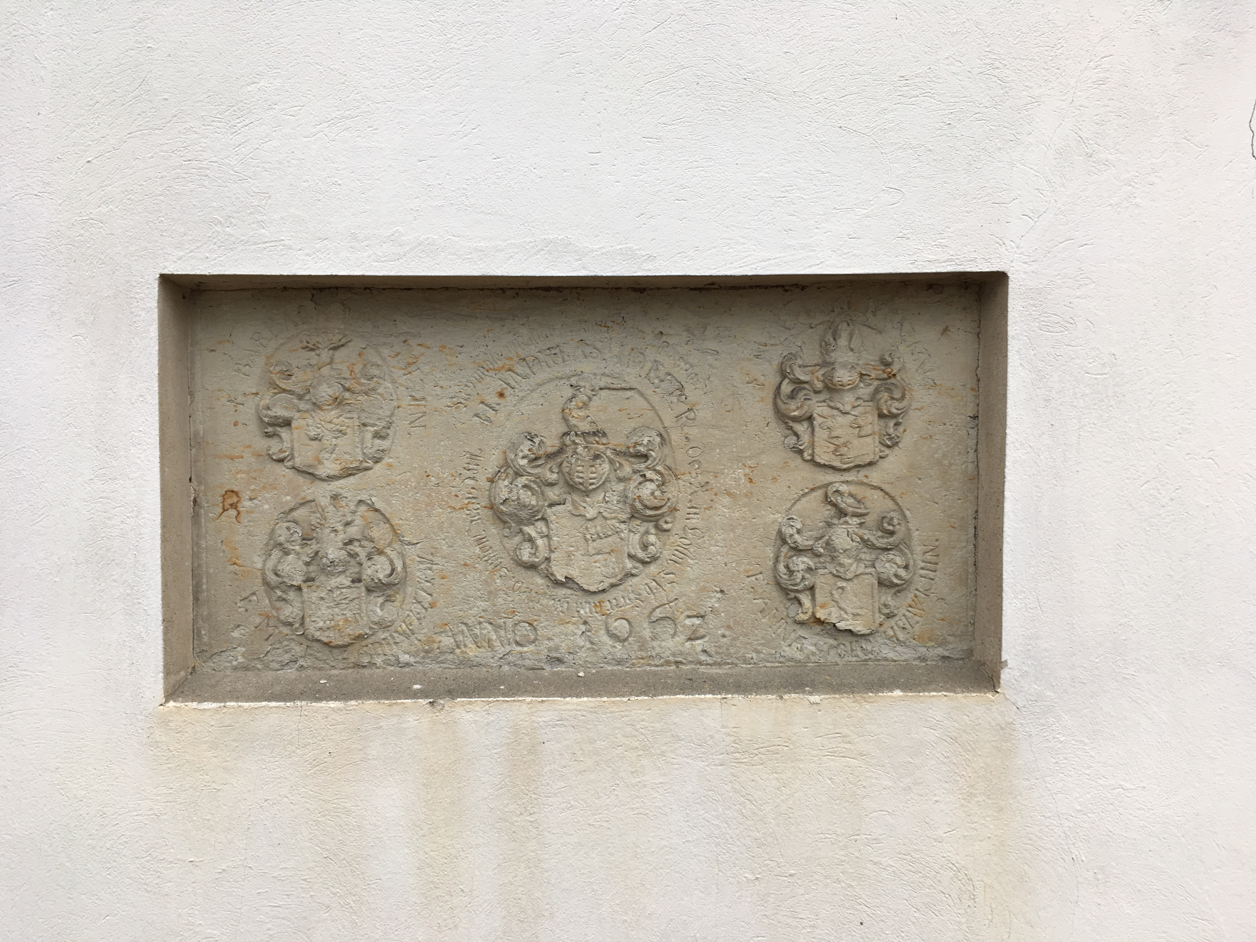 Die Dorfkirche Gräbendorf entstand vermutlich um 1350 und wurde im Dreißigjährigen Krieg zerstört. 1662 wieder aufgebaut befindet sich im Innenraum unter anderem eine hölzerne Kanzel aus der Zeit um 1700.